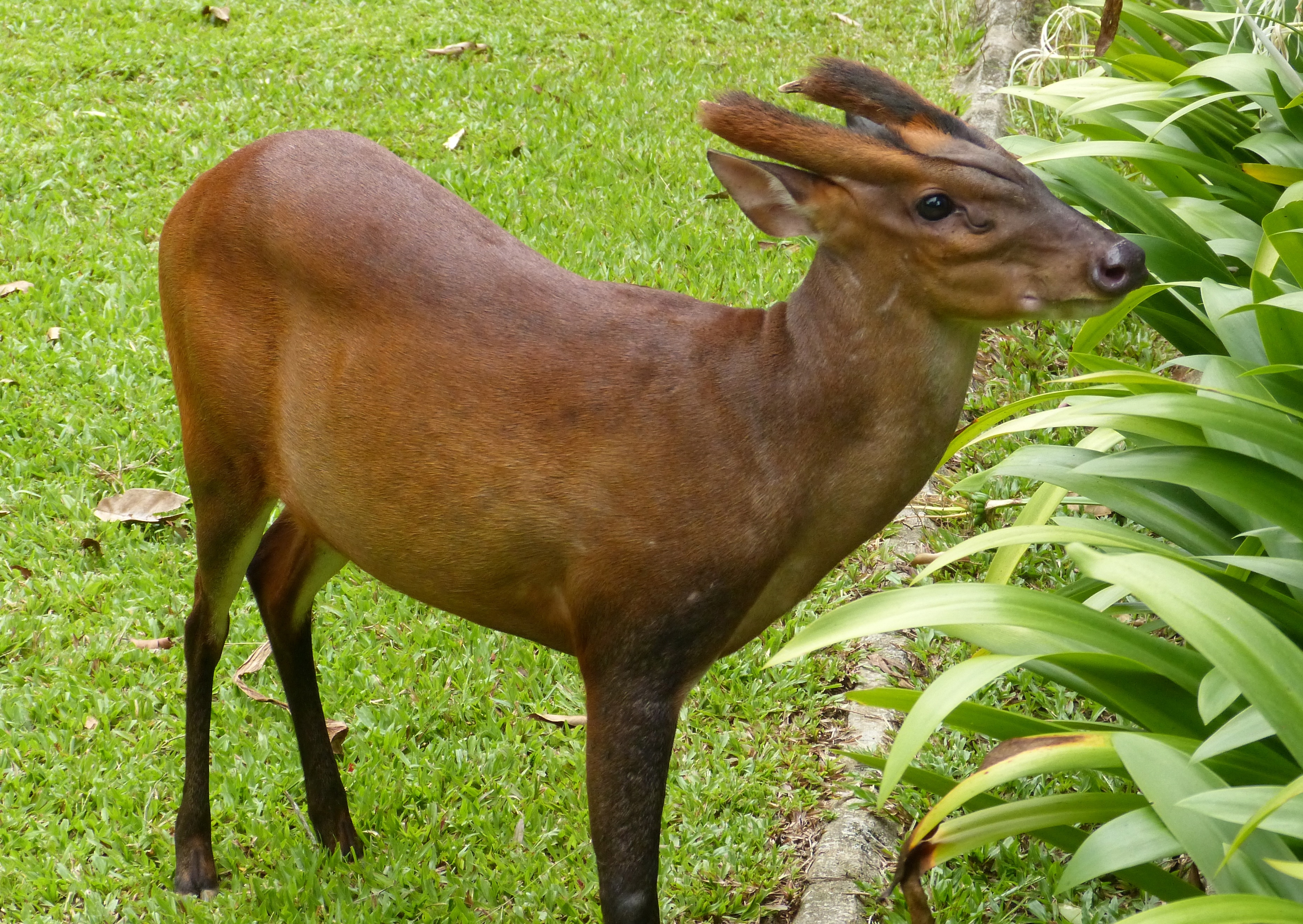 Mutiara Resort, Taman Negara NP, Pahang, MALAYSIA